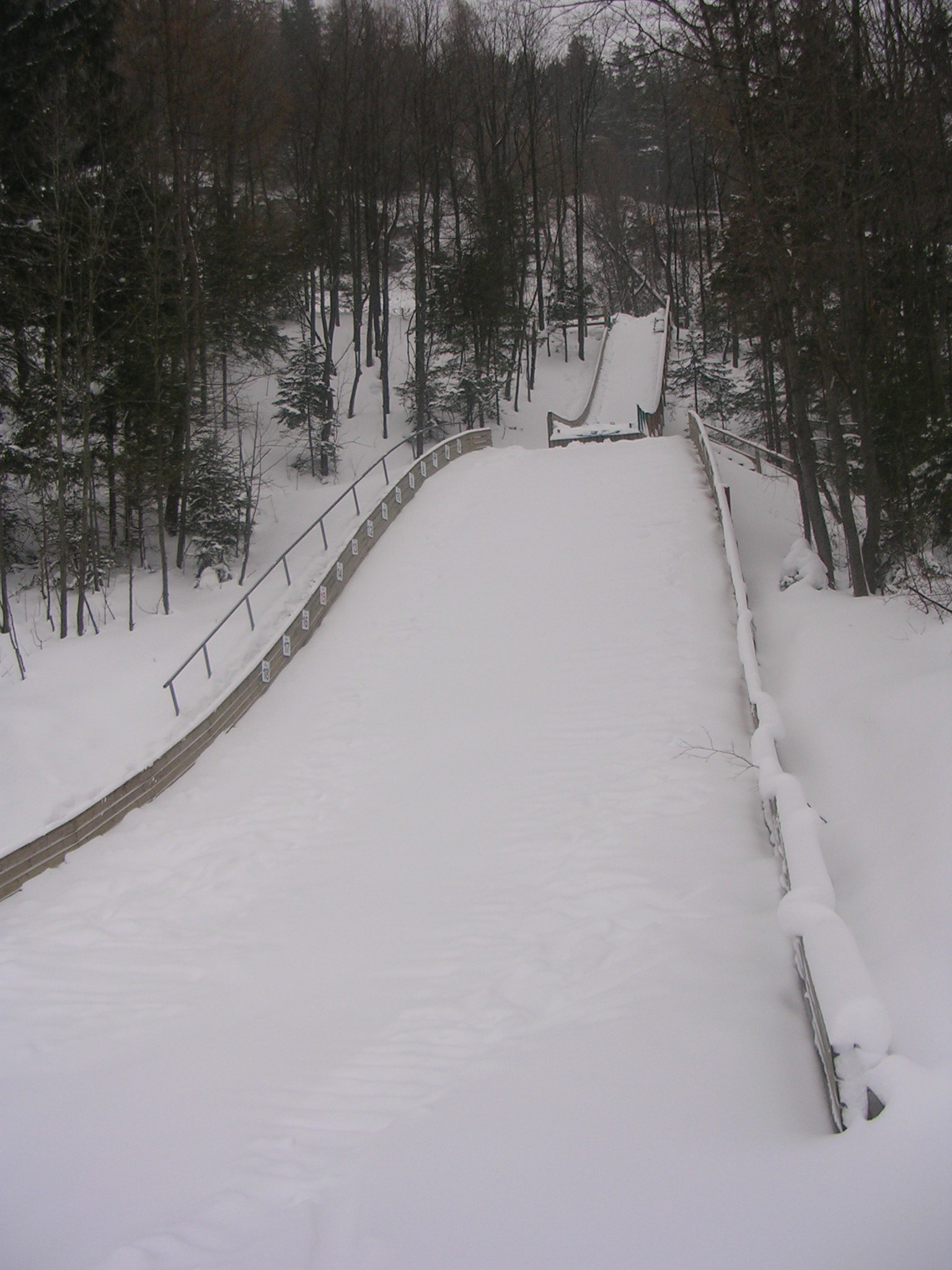 Zdję™cie skoczni "Adaś›" w Zakopanem wykonane na początku lutego 2007 roku.